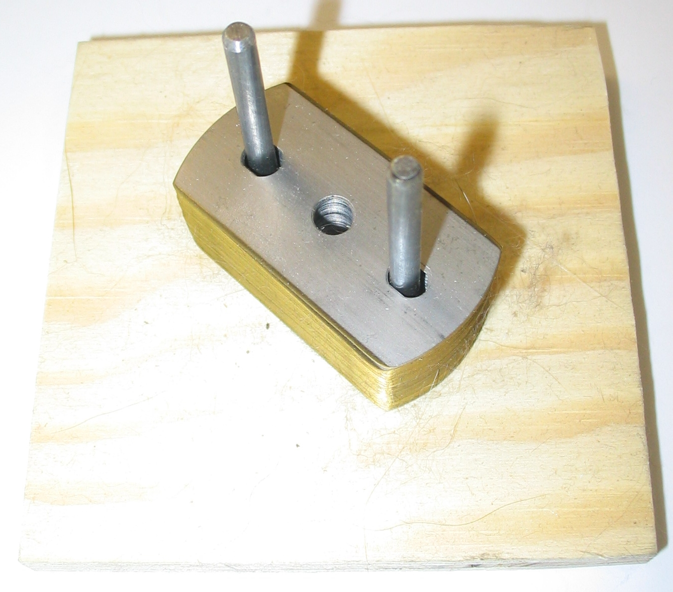 Klingen für Kürschnermesser. Gesehen beim Kürschner Germain Martens, Lochristi, Belgien.